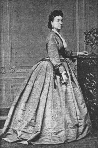 Marie Augustine Vernet (1825–1898)